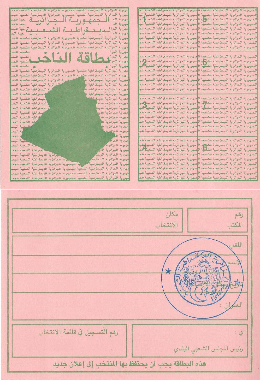 carte électorale algérienne (recto verso)